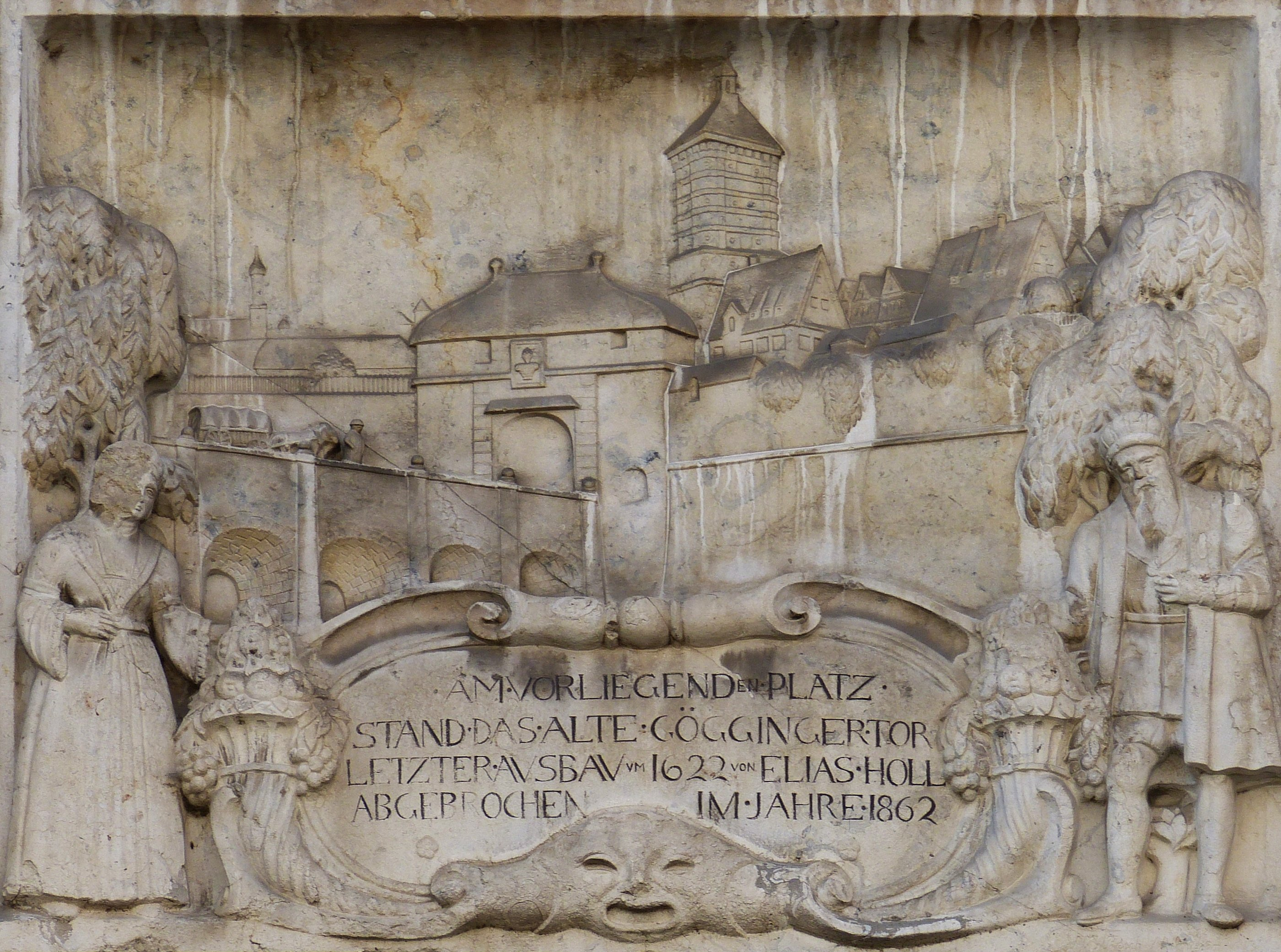 Steinrelief zur Erinnerung an das abgerissene Gögginger Tor in Augsburg, Bürgermeister-Fischer-Straße 9-11.